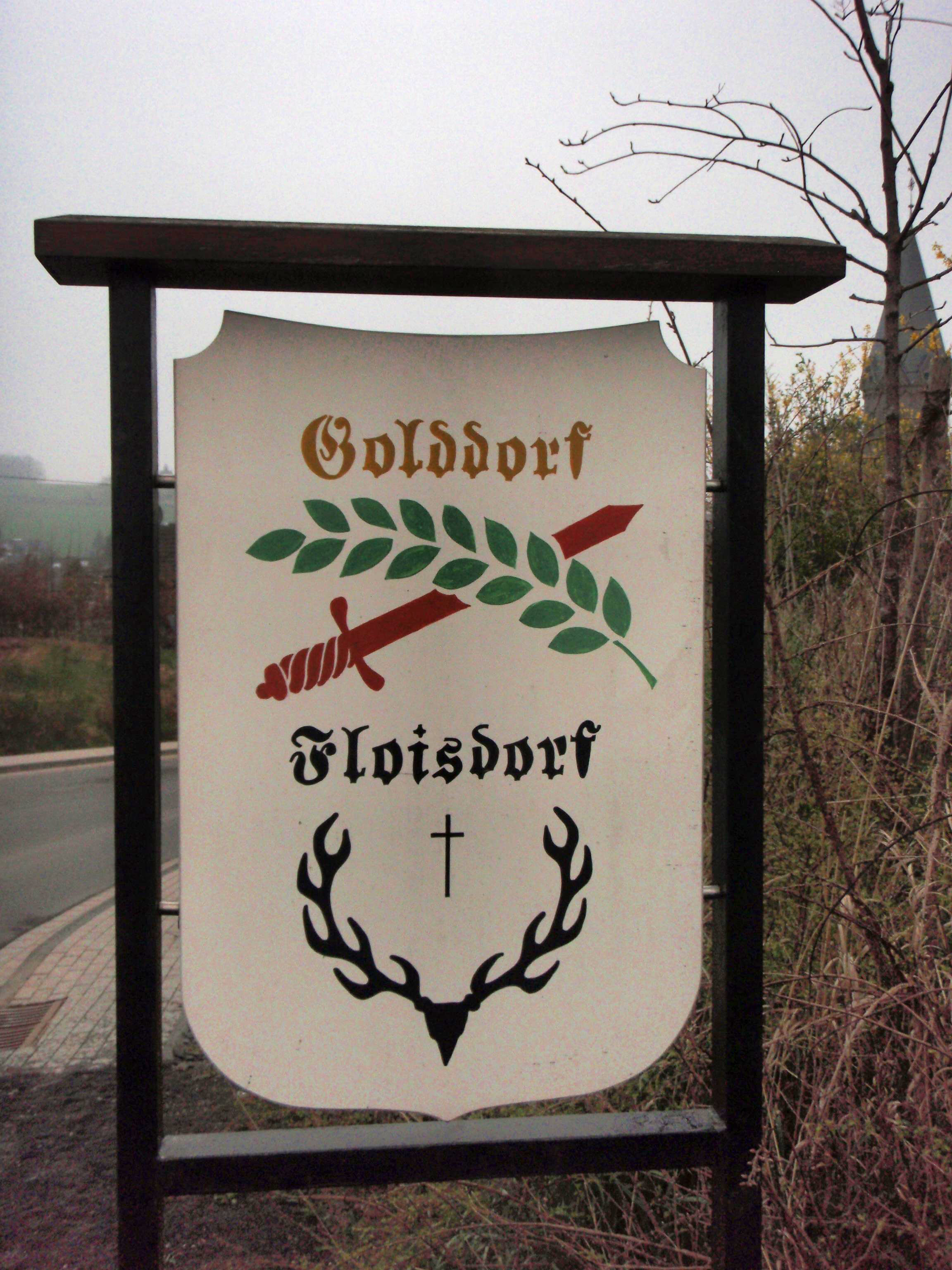 Ortsschild Floisdorf mit Wappen